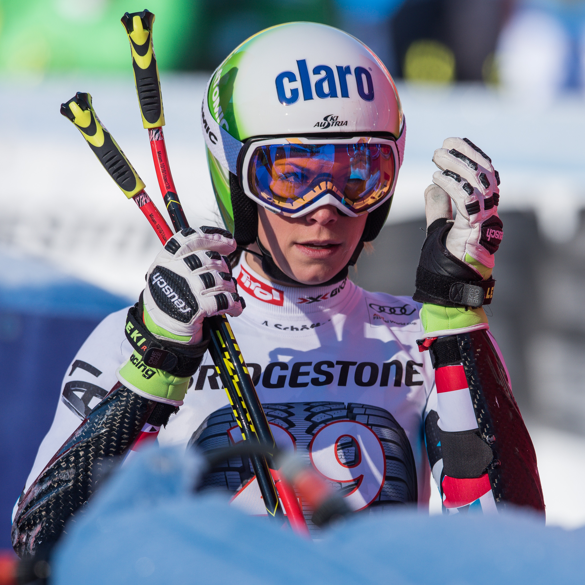 64. Kandahar Rennen,Audi FIS Ski Weltcup Garmisch-Partenkirchen,Damen Super-G,Kandahar,Ladies Super-G,Mirjam Puchner